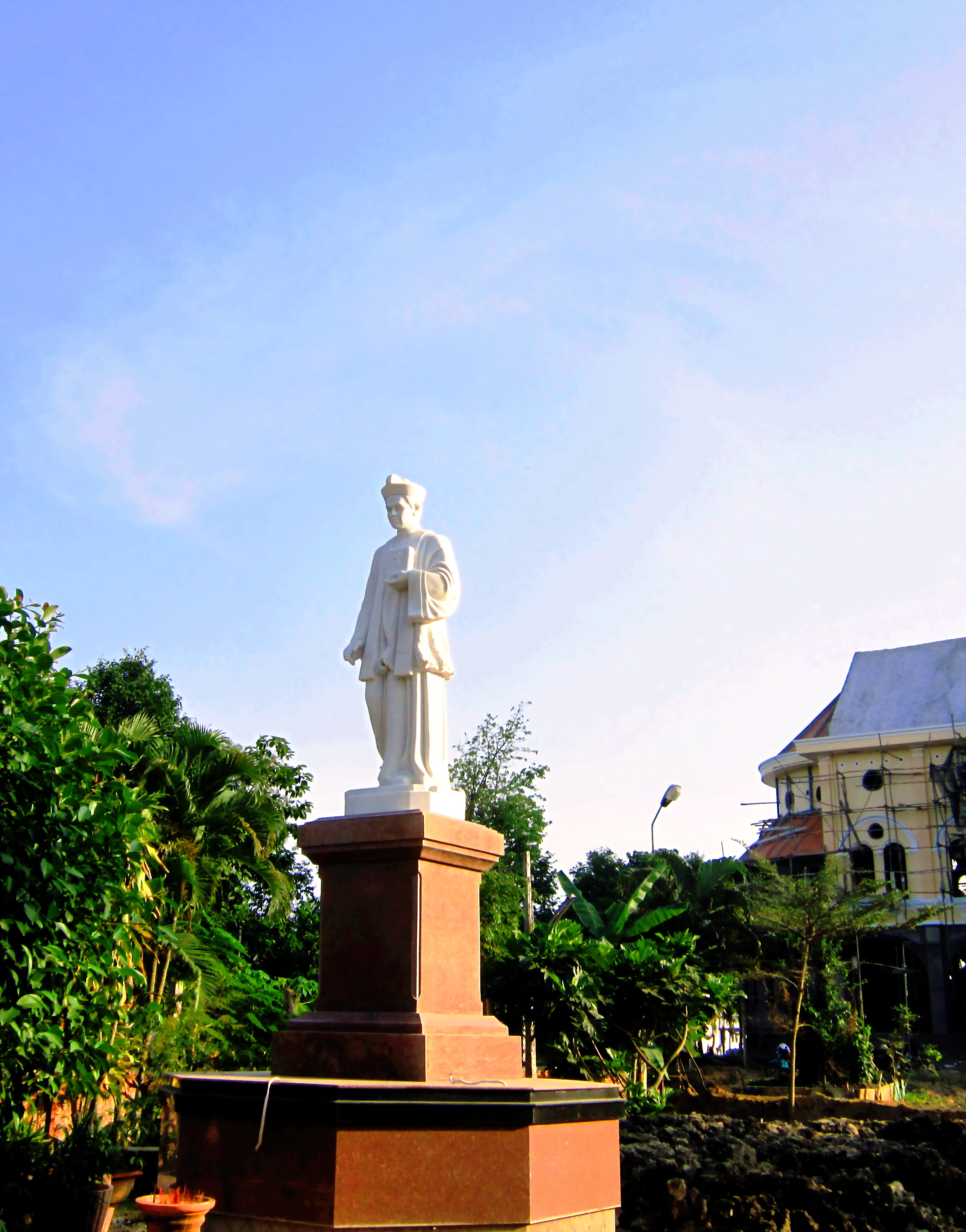 Tượng Philípphê Phan Văn Minh (1815 - 1853, là một vị thánh tử đạo Việt Nam) ở sân nhà thờ Giáo xứ Ðình Khao, thuộc ấp Thanh Mỹ 1, xã Thanh Ðức, huyện Long Hồ, Vĩnh Long, Việt Nam.